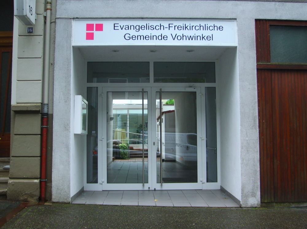 Gebäude der Evangelisch-Freikirchlichen Gemeinde Vohwinkel, Wuppertal, Germany